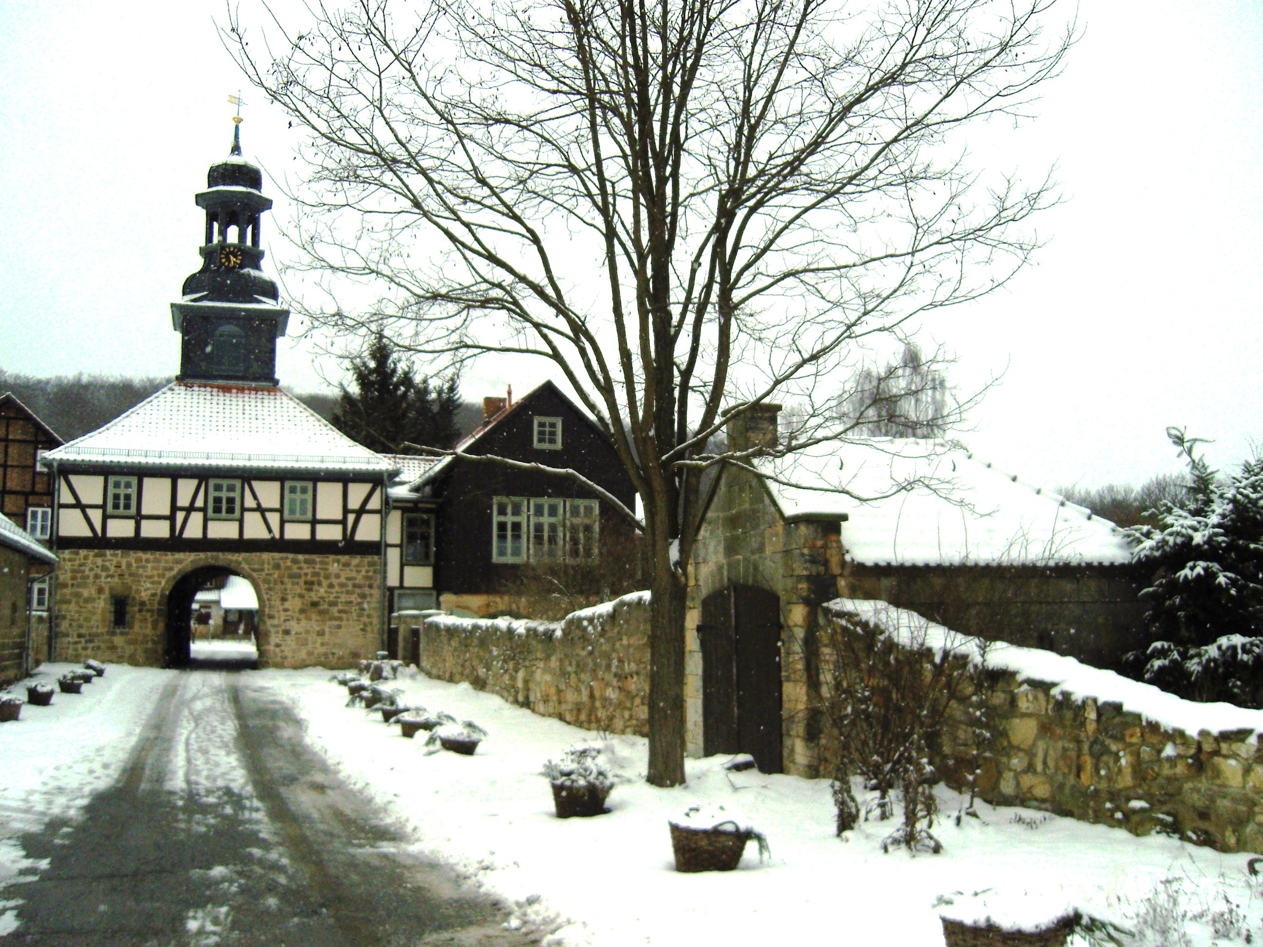 Kloster Michaelstein; Innenansicht zum Tor